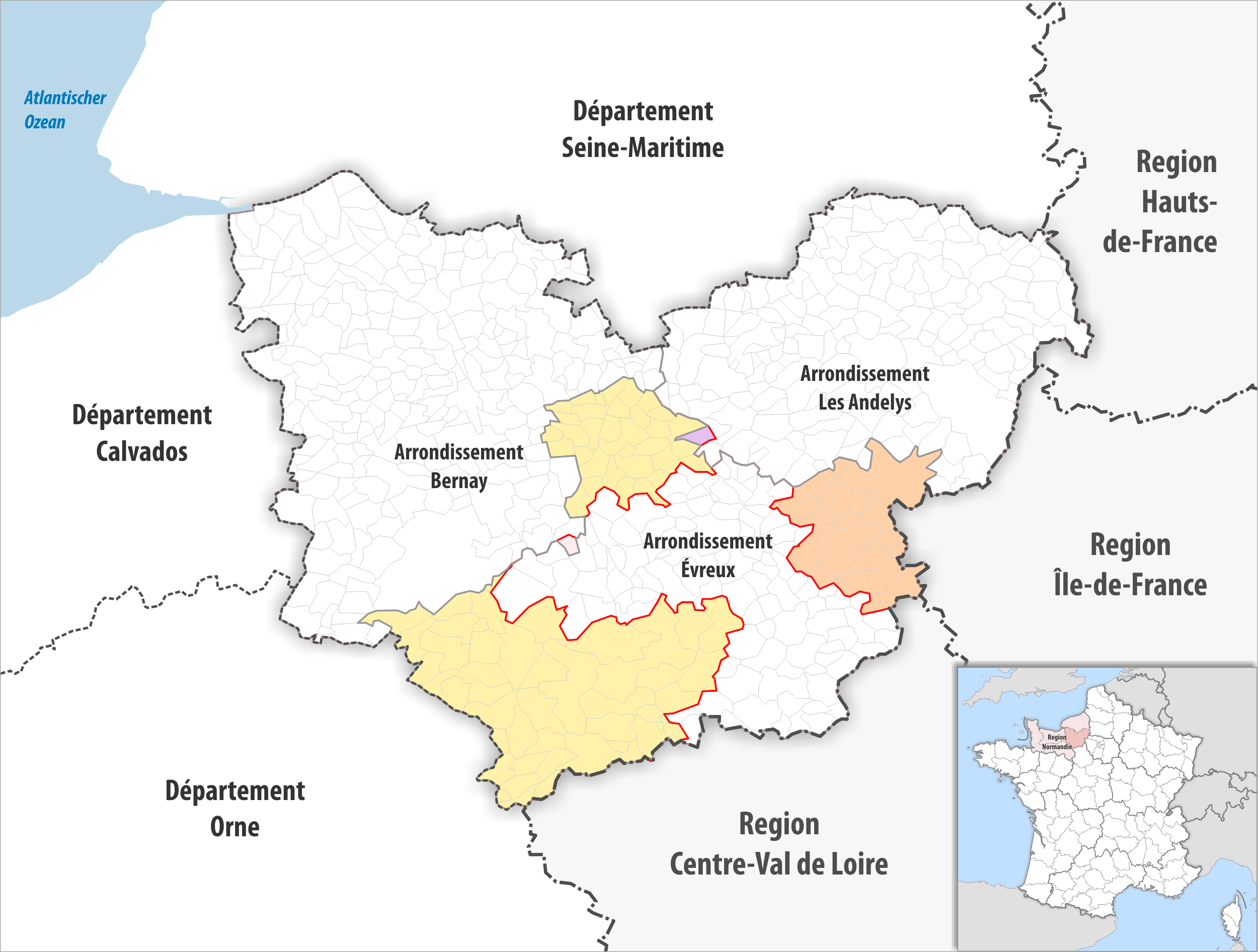 Arrondissements Anpassungen auf 2017 im Departement Eure